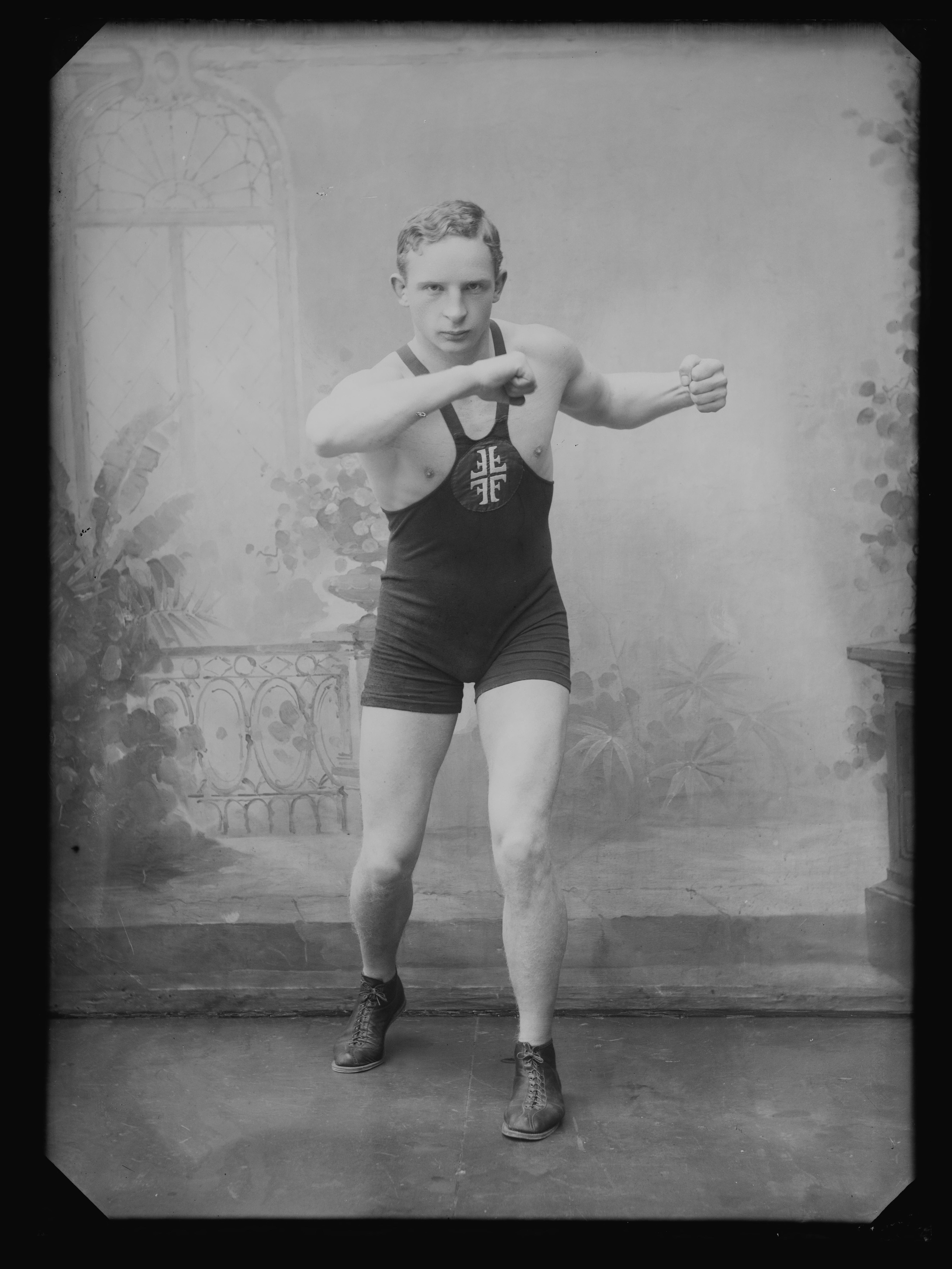 Bildet er hentet fra Nasjonalbibliotekets bildesamling. Anmerkninger til bildet var: Påskrift arkivark: Hr. Brustad, boxer Arkivnummer: 205